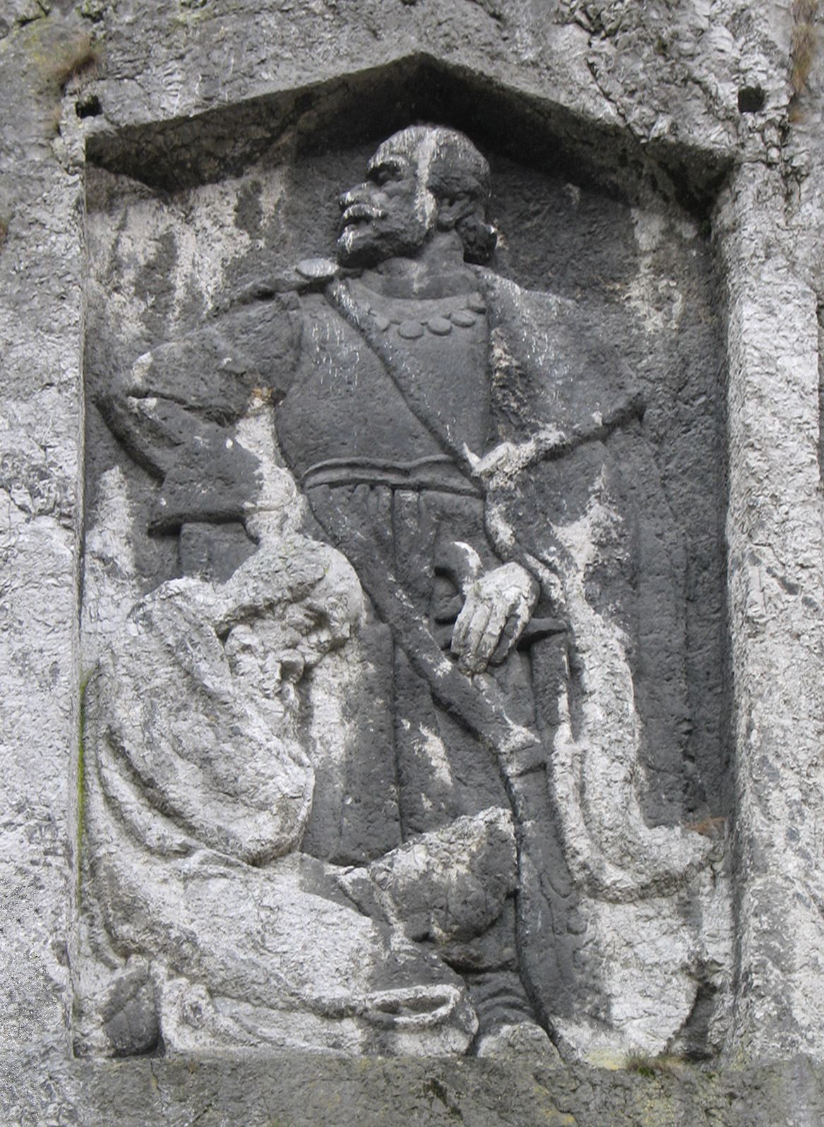 Reliéf Jána Jiskru z Brandýsa na trenčianskej hradnej skále bol vytesaný po vzniku Česko-Slovenskej republiky a odstránil starý reliég glorifikujúci maďaronstvo